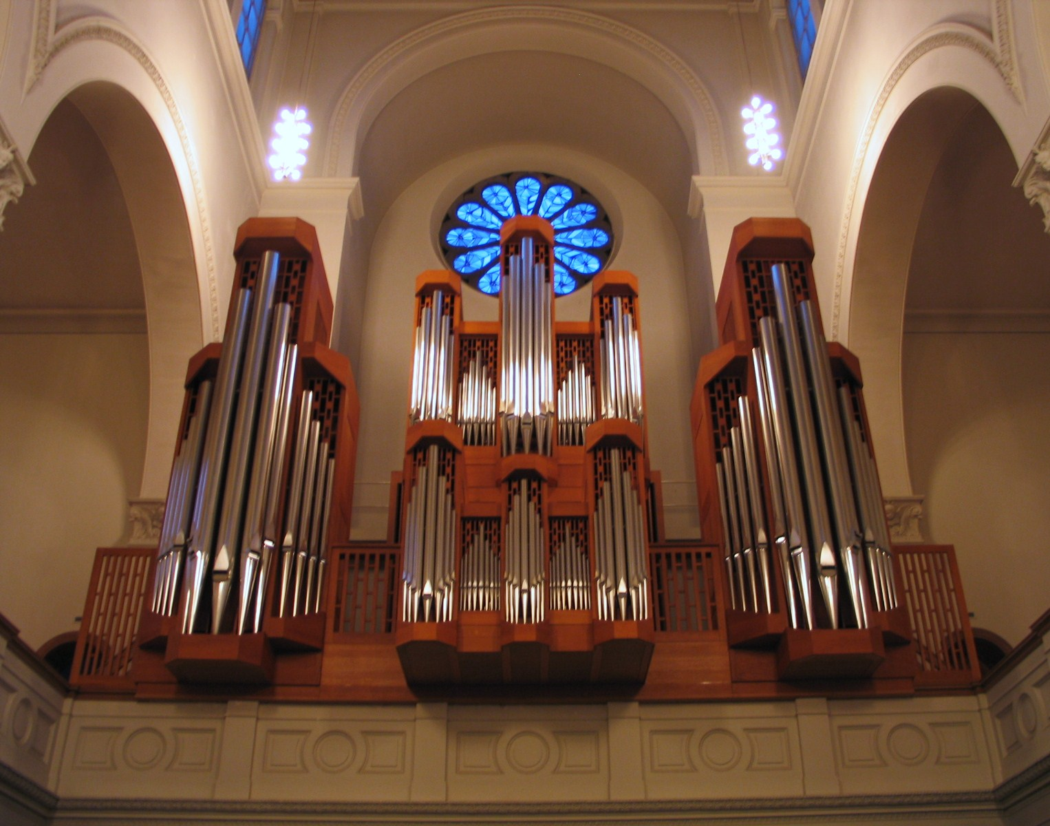 Orgel der evangelischen Trinitatiskirche, Köln